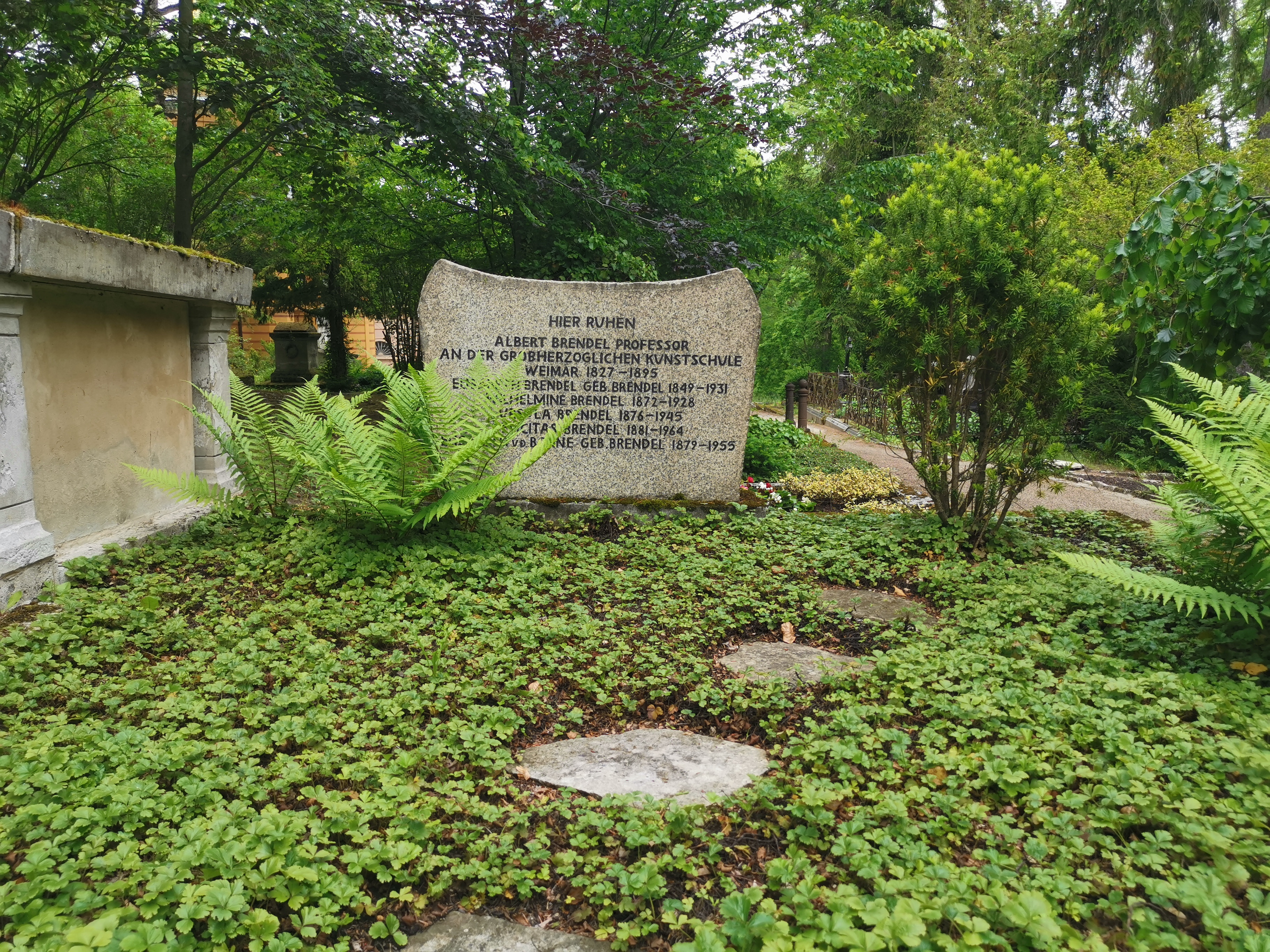 Grabstätte Prof. Albert Brendel; Historischer Friedhof Weimar